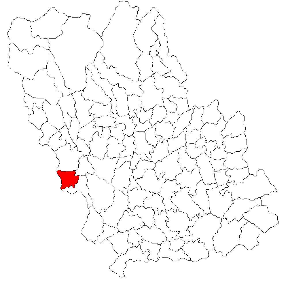 Categorie:Hărţi ale judeţului Prahova